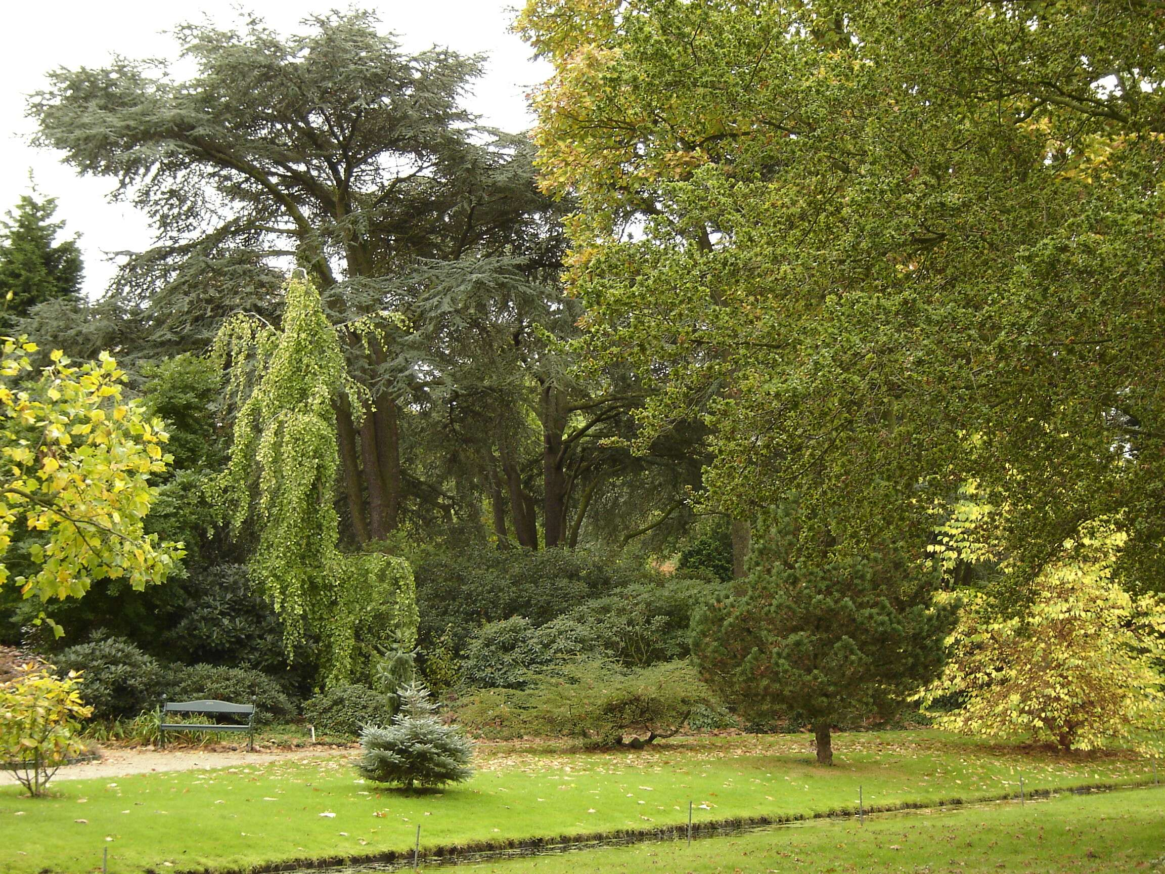 Arboretum Trompenburg, Rotterdam, Netherlands